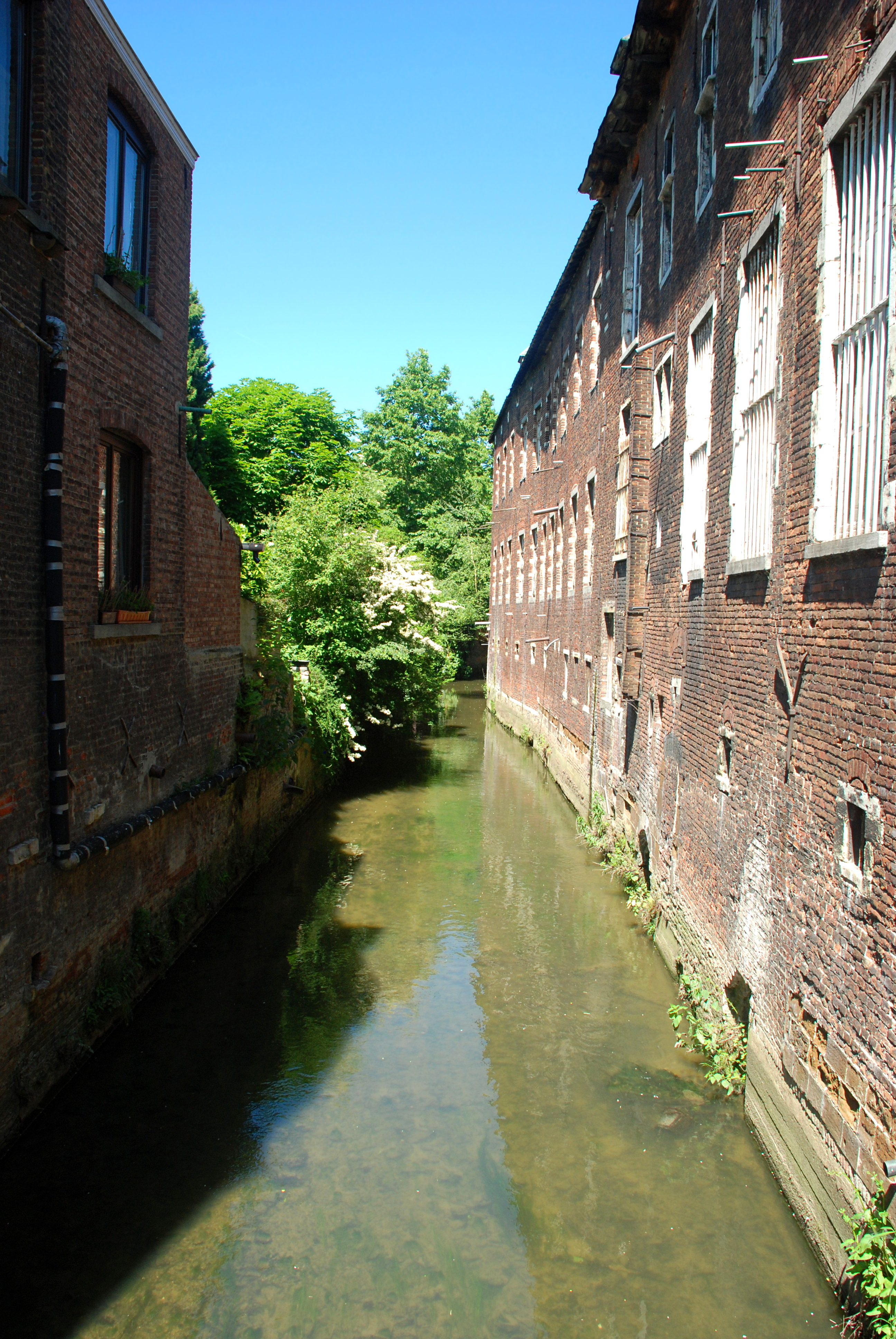 Belgique - Louvain - Couvent des Sœurs Noires : la Dyle